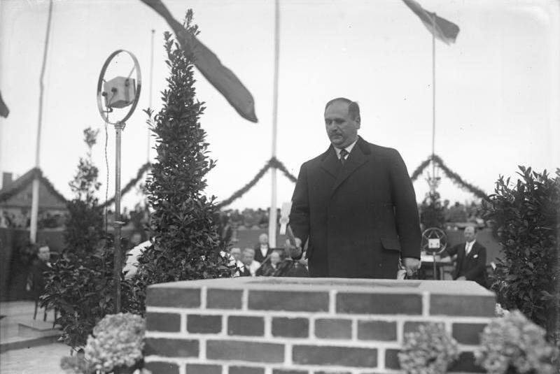 Die feierliche Grundsteinlegung des neuen Funkhauses am Reichskanzlerplatz in Berlin! Das neue Funkhaus soll das schönste und modernste der Welt werden. Reichsfunk-Kommisar Dr. von Bredow beim Vollziehen der drei Hammerschläge während der Grundsteinlegung.